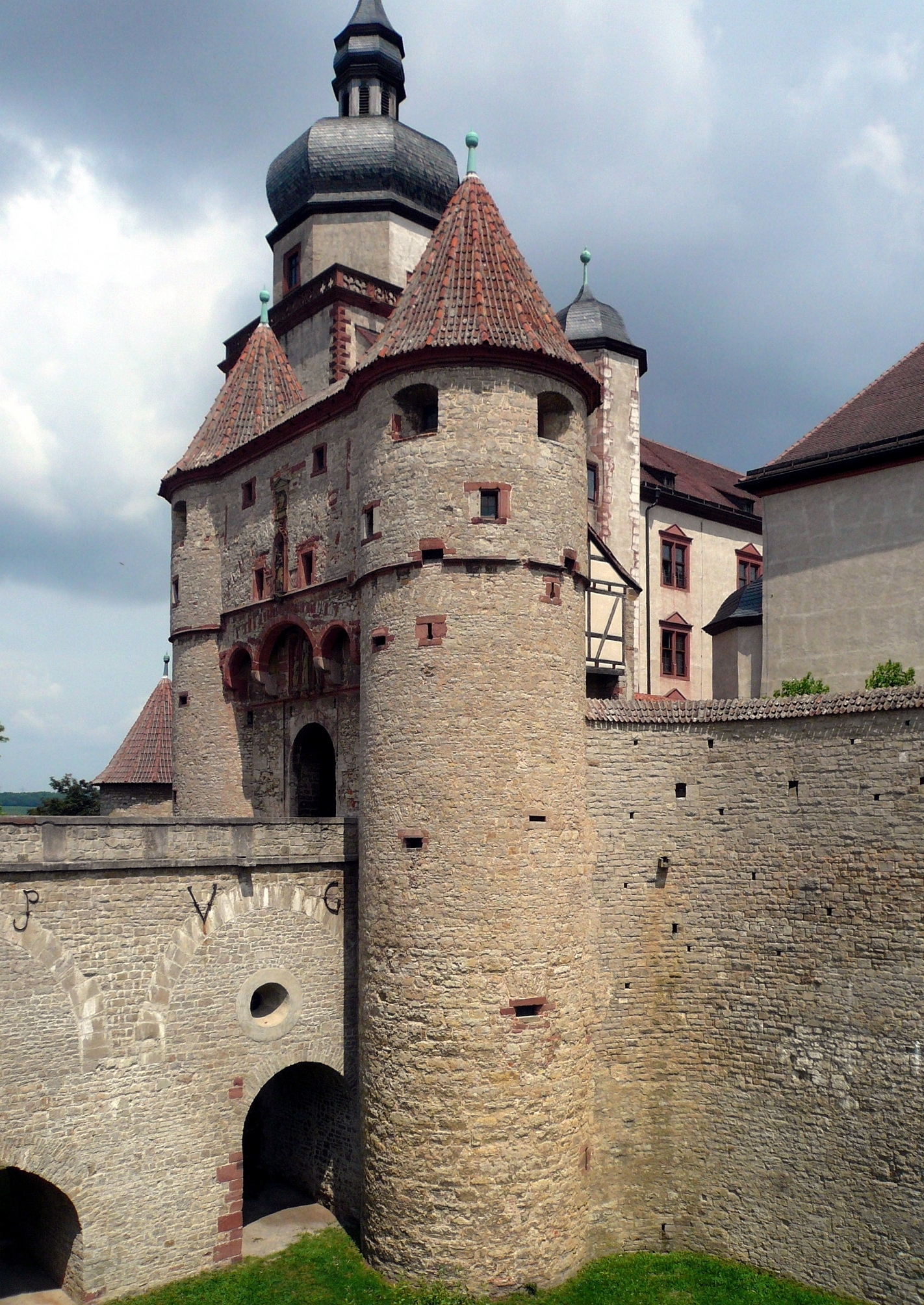 Unter Otto II. von Wolfskeel (1333–1345) errichtetes Eingangsbollwerk der Festung Marienberg, welches unter Rudolf II. von Scherenberg (1466–1495) verstärkt worden ist.